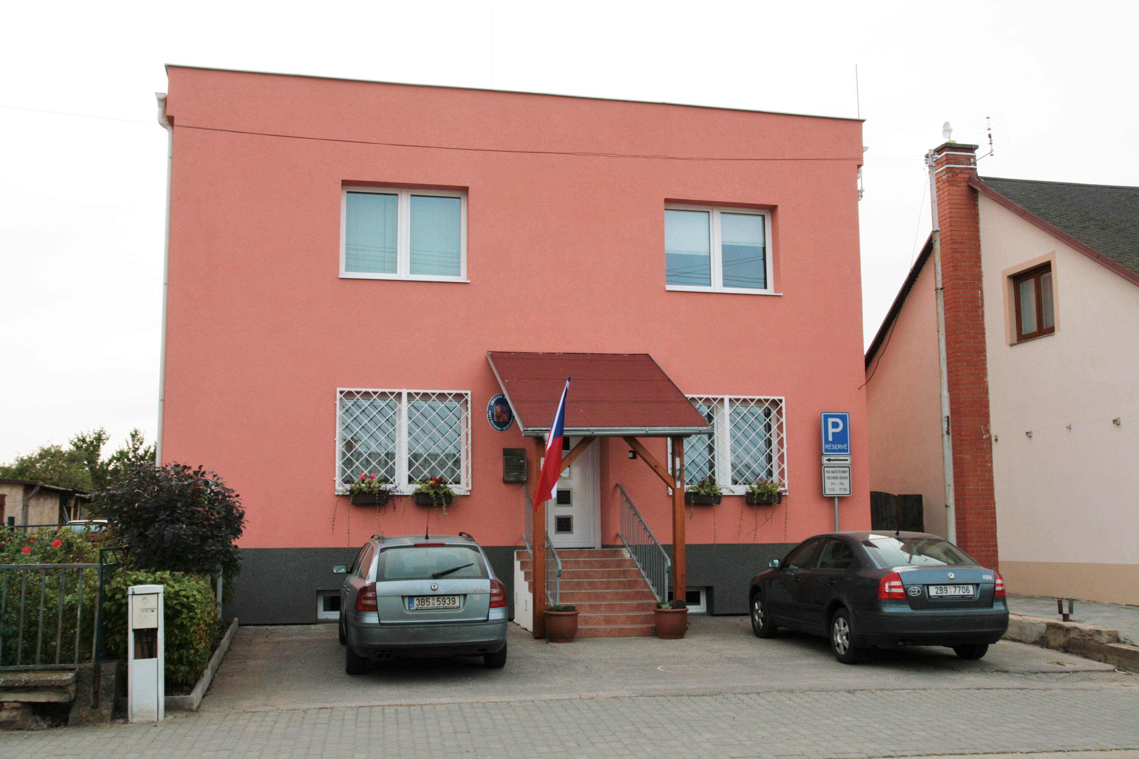 Nový Šaldorf, část obce Nový Šaldorf - Sedlešovice v okrese Znojmo. Obecní úřad.